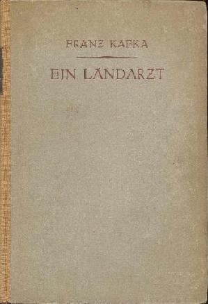 Scan of Franz Kafka's Ein Landarzt.